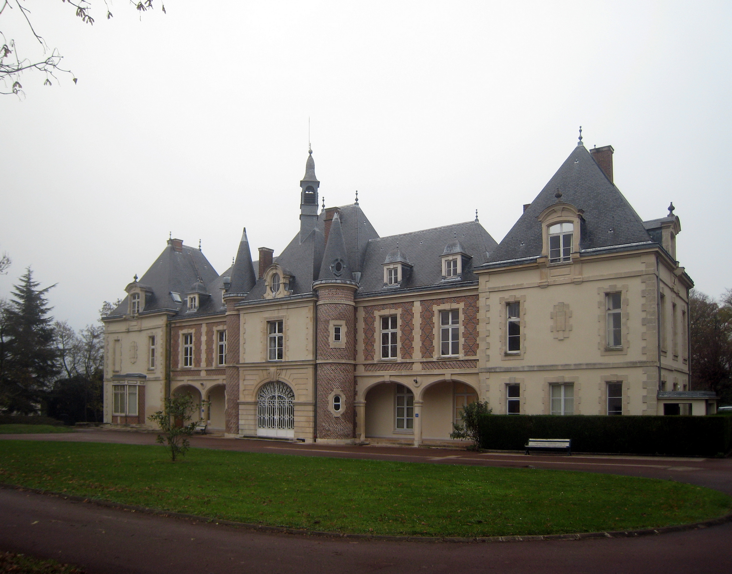 Château de Cannes-Ecluse (Seine-et-Marne), direction de l'ENSOP